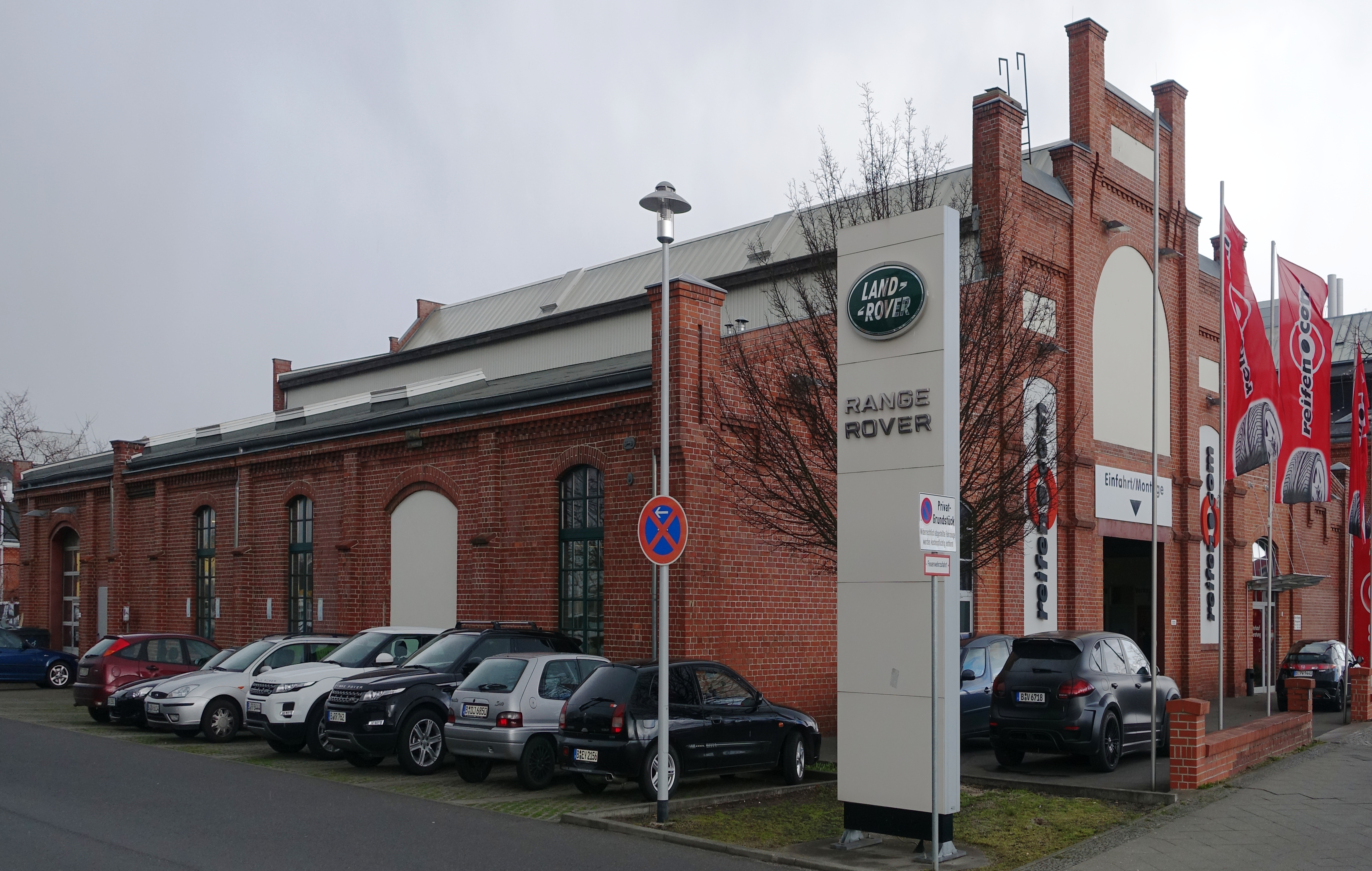 Weichenbauhalle